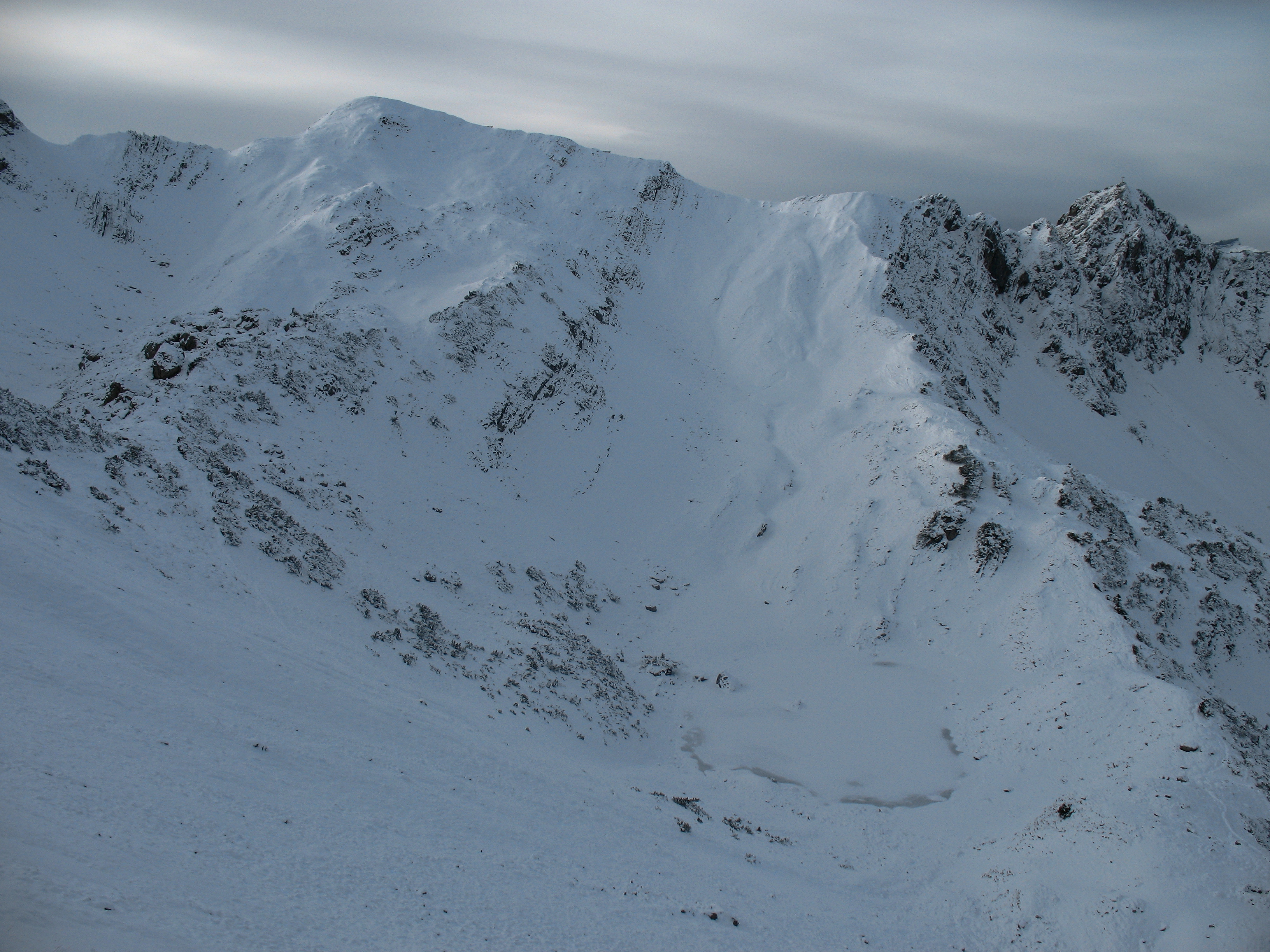 Blick aus der Südwestflanke des Entschenkopfs auf Geißfuß (1981 m) und den Verbindungsgrat zum Gaisalphorn (1953 m), darunter der Obere Gaisalpsee (1769 m).